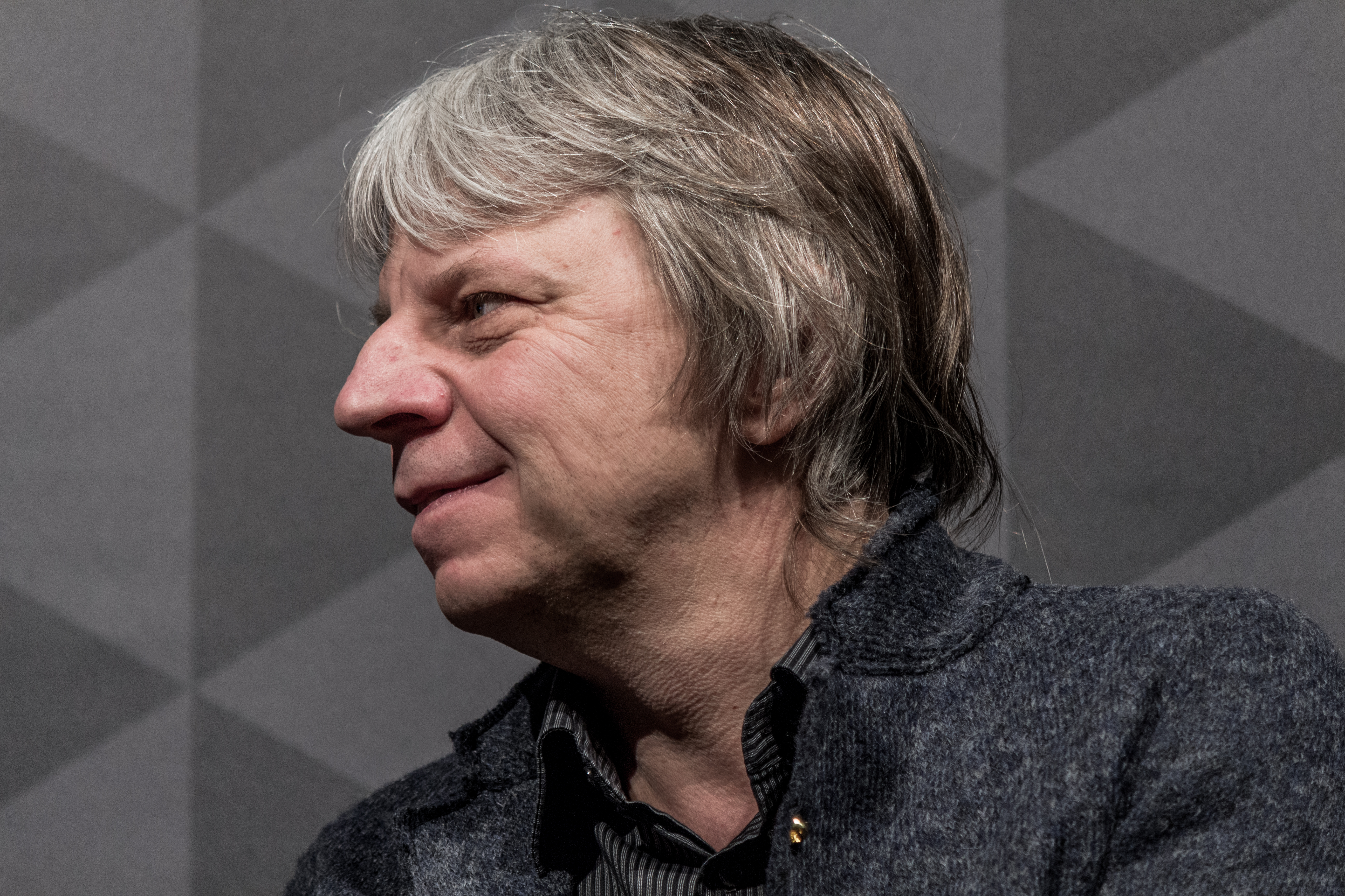 Andreas Dresen auf der Berlinale